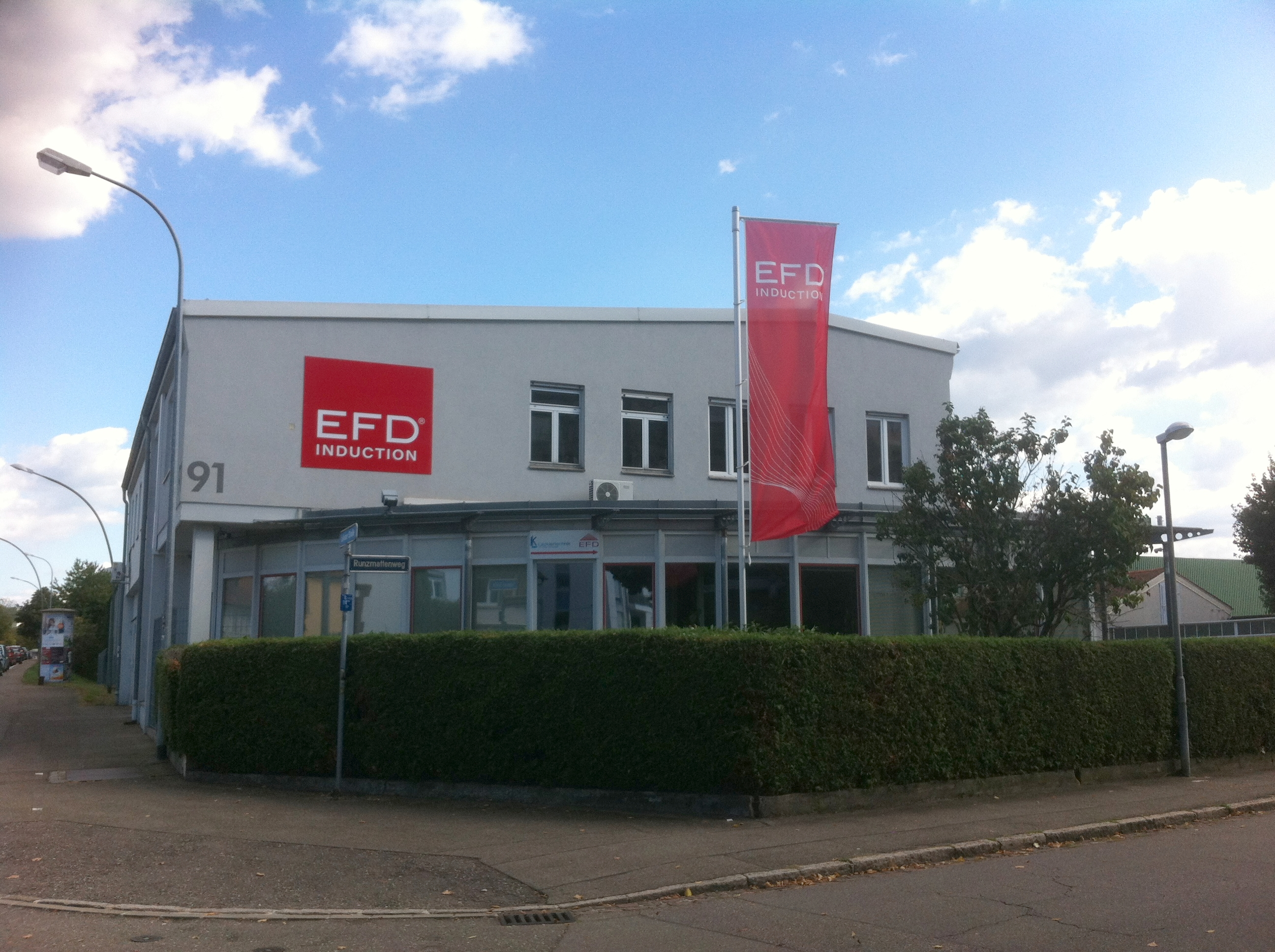 Werksgebäude von EFD Induction GmbH